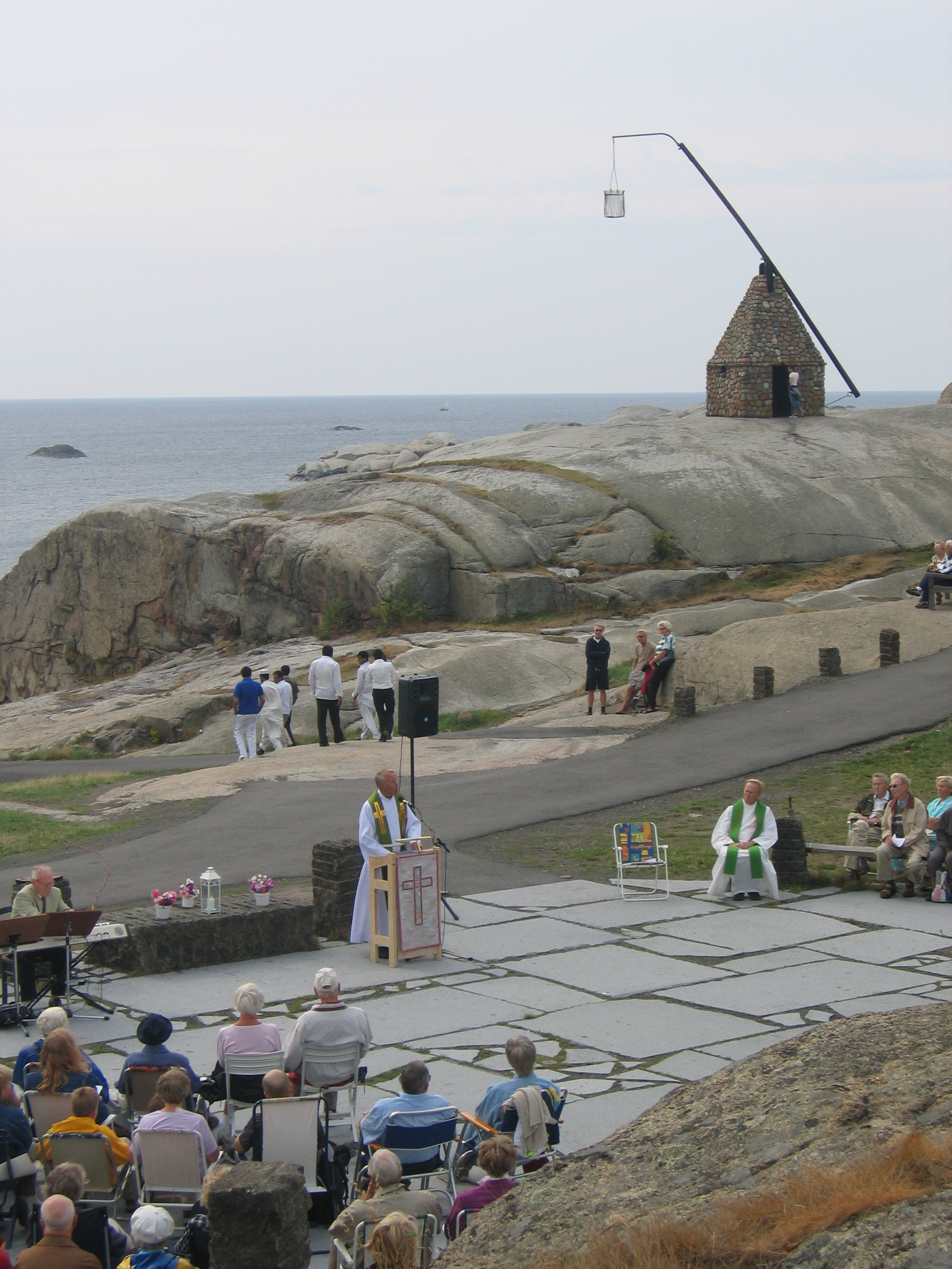 Tjømes tusenårssted